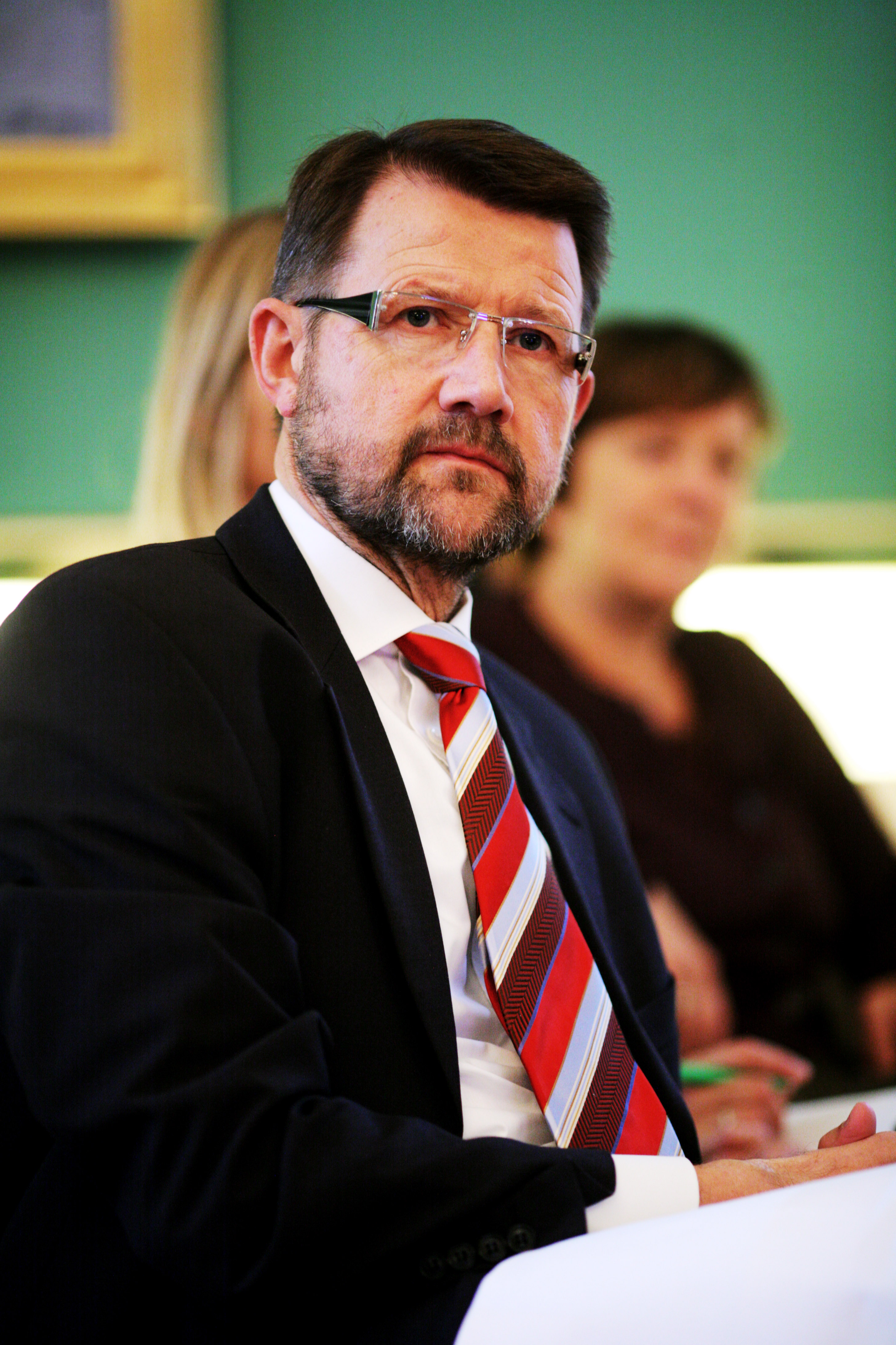 Helge Sander, forskningsminister Danmark, under Nordiska rådets session i Köpenhamn 2006.